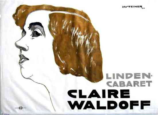 Manifesto per spettacolo di cabaret di Claire Waldoff, a Berlino, nel 1914.